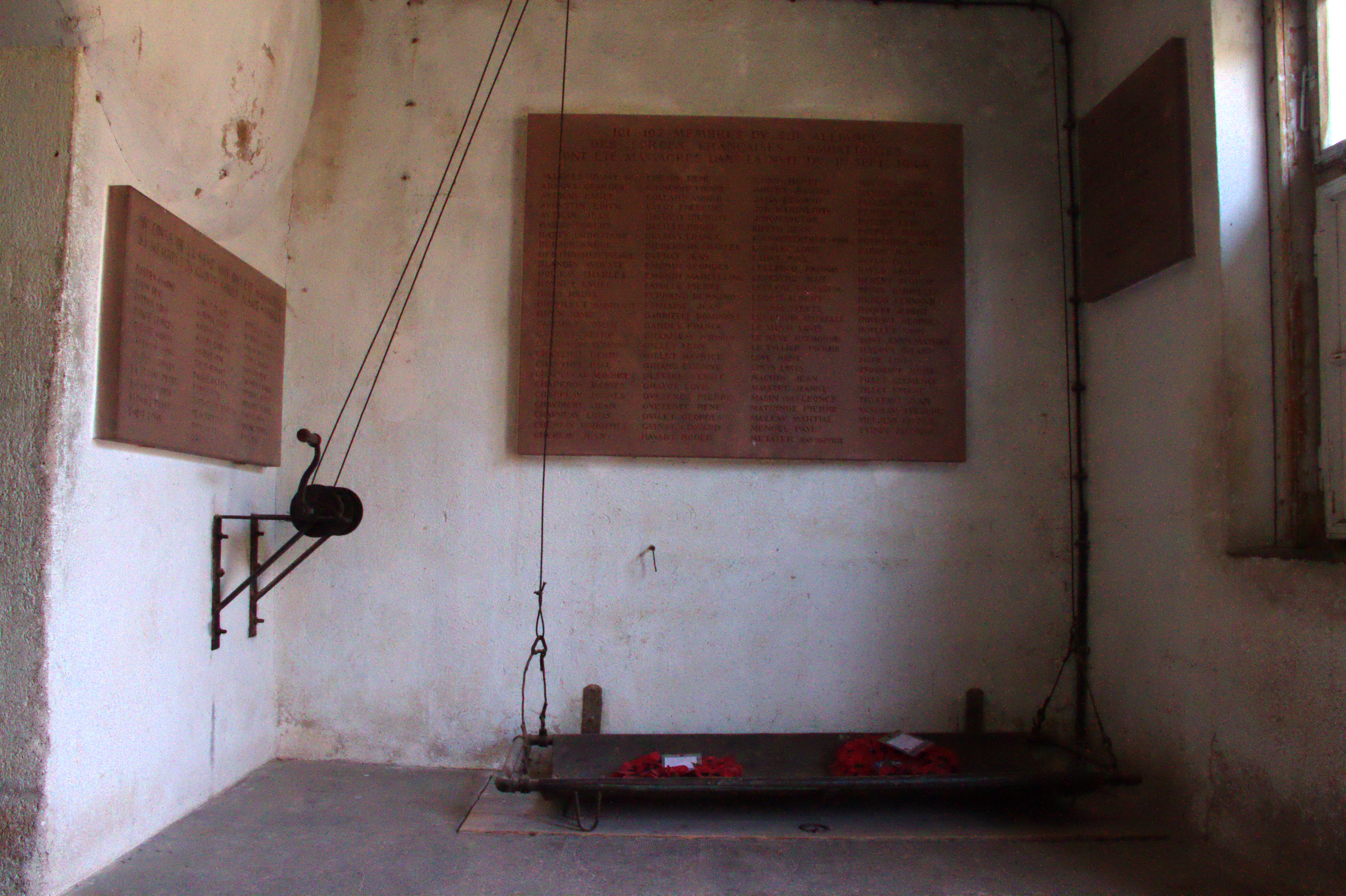 Camp de concentration de Natzwiller-Struthof. Les plaques mémorielles et l’ascenseur servant à monter les cadavres de la morgue.